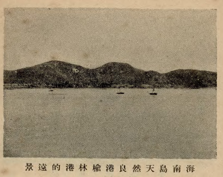 中文（中国大陆）: 中國新海軍插圖